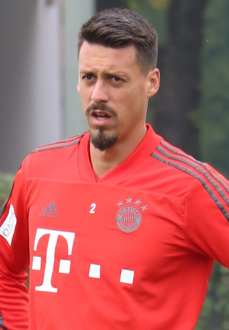 Sandro Wagner beim Training am 9. Oktober 2018